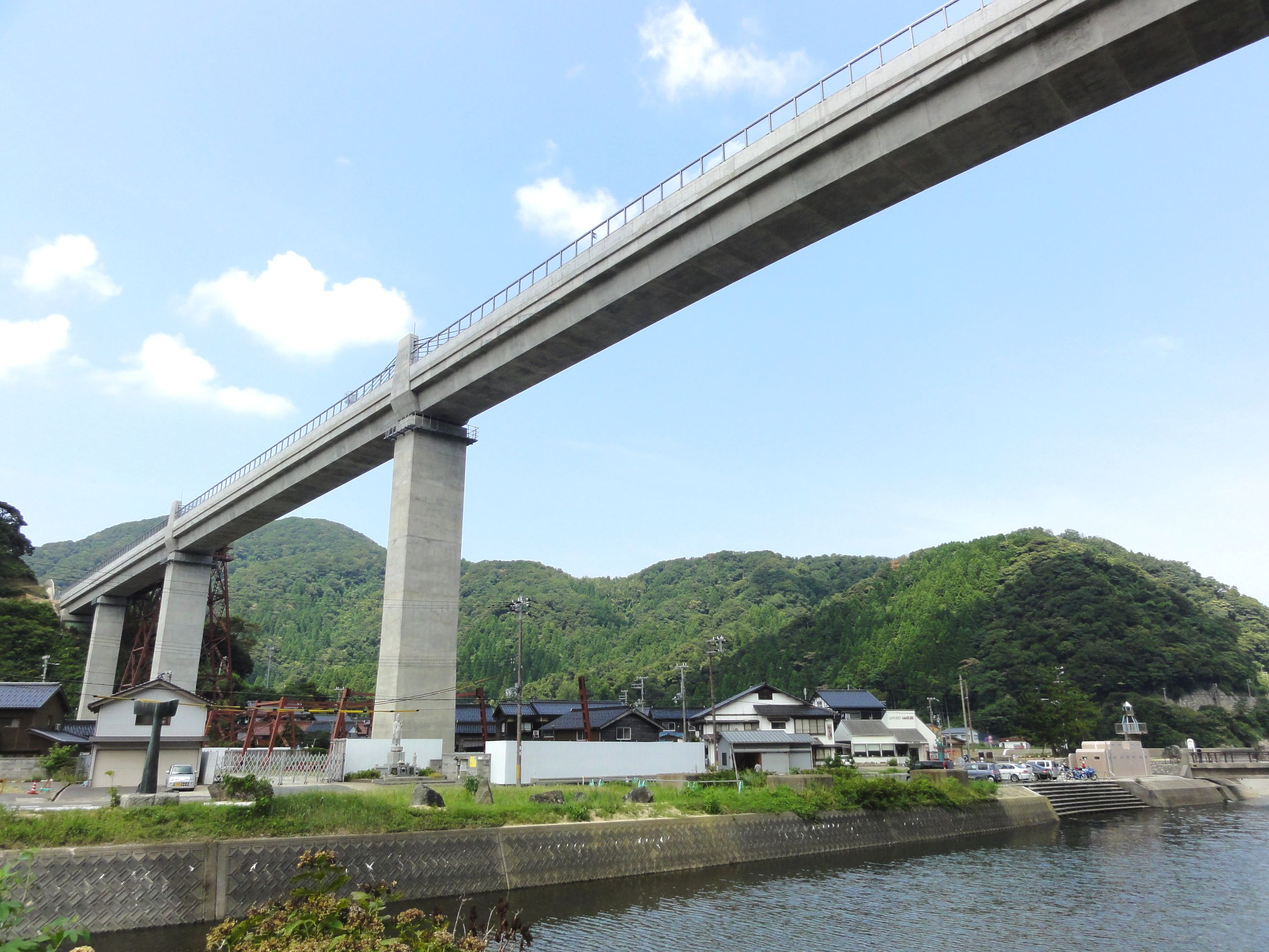 余部橋梁（現橋梁）